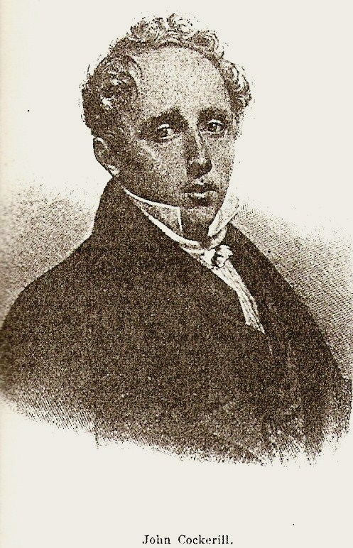 Scan einer in Maccos Buch abgedruckten Ablichtung eines Portraits aus dem Familienbesitz